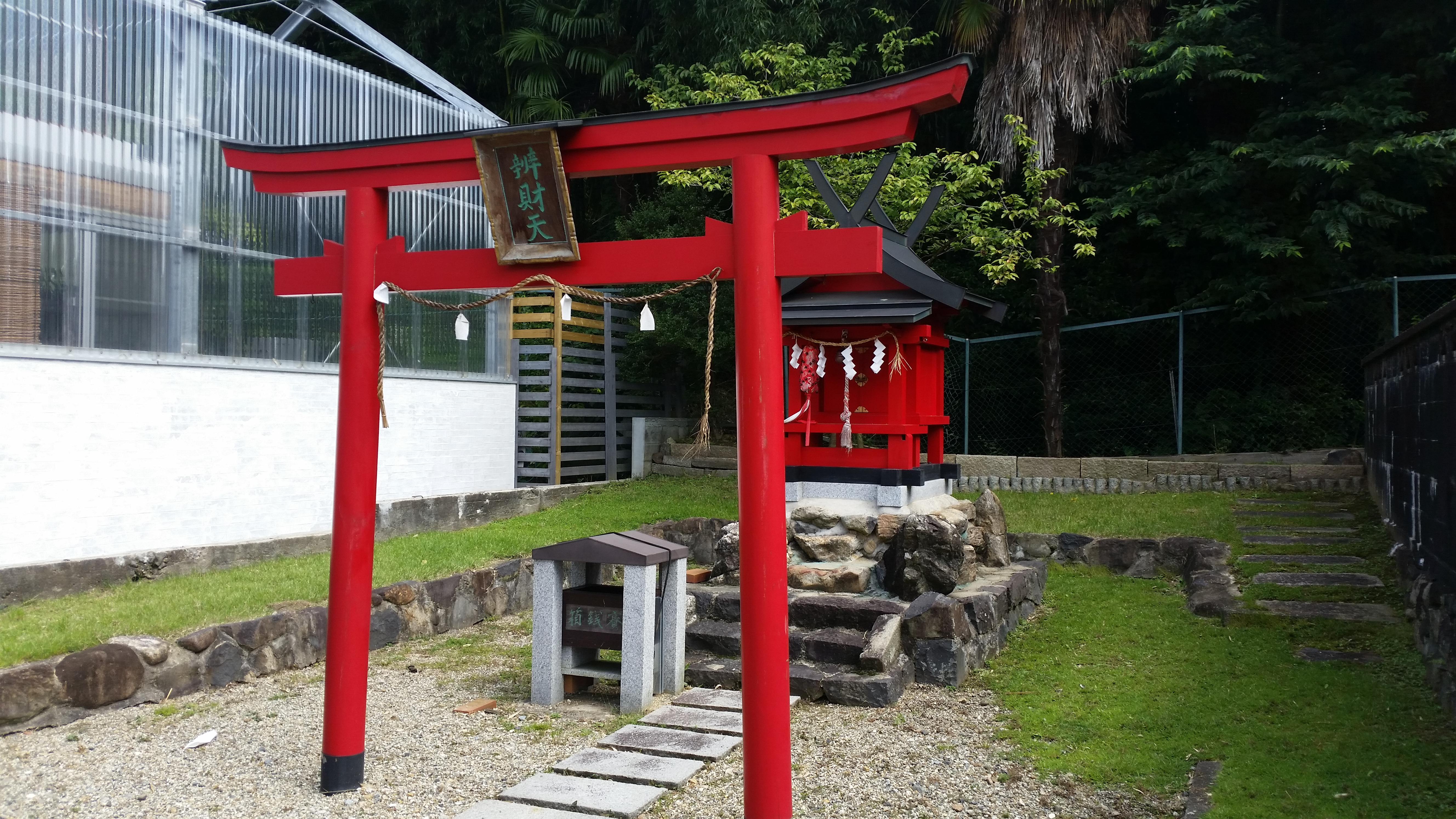 弁財天社、八坂神社、奈良きたまち